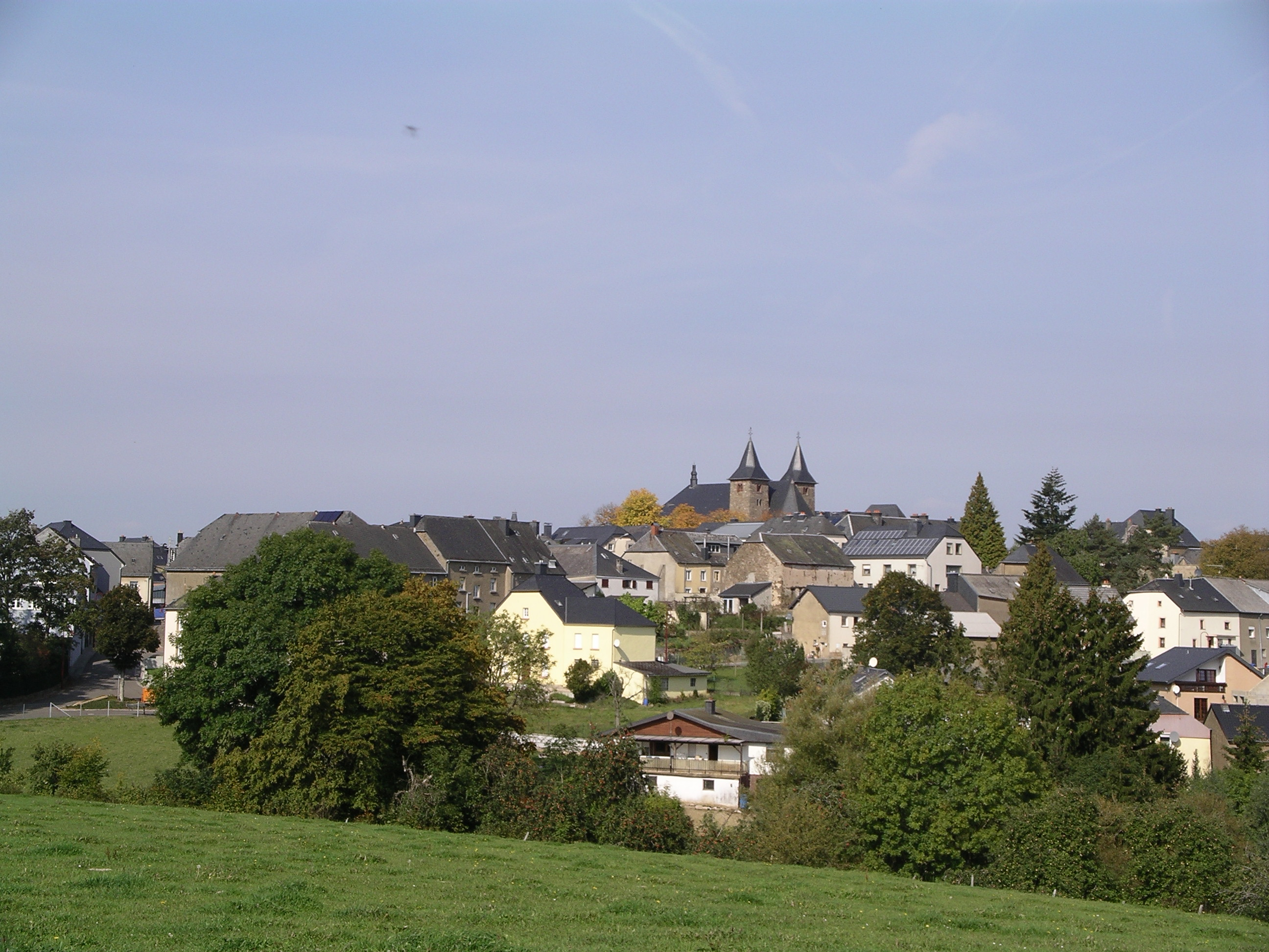 Blick auf die Gemeinde Hosingen